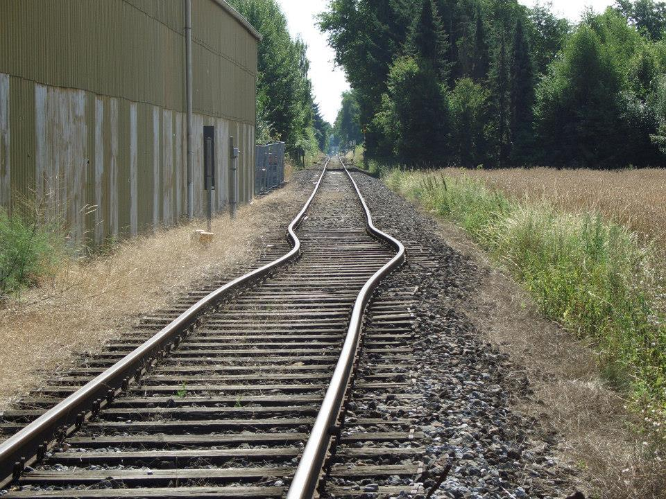 Gleisverwerfung auf der Teutoburger Wald-Eisenbahn (TWE) am ehemaligen Bahnhof Gütersloh Ost (Blick in Richtung Spexard)